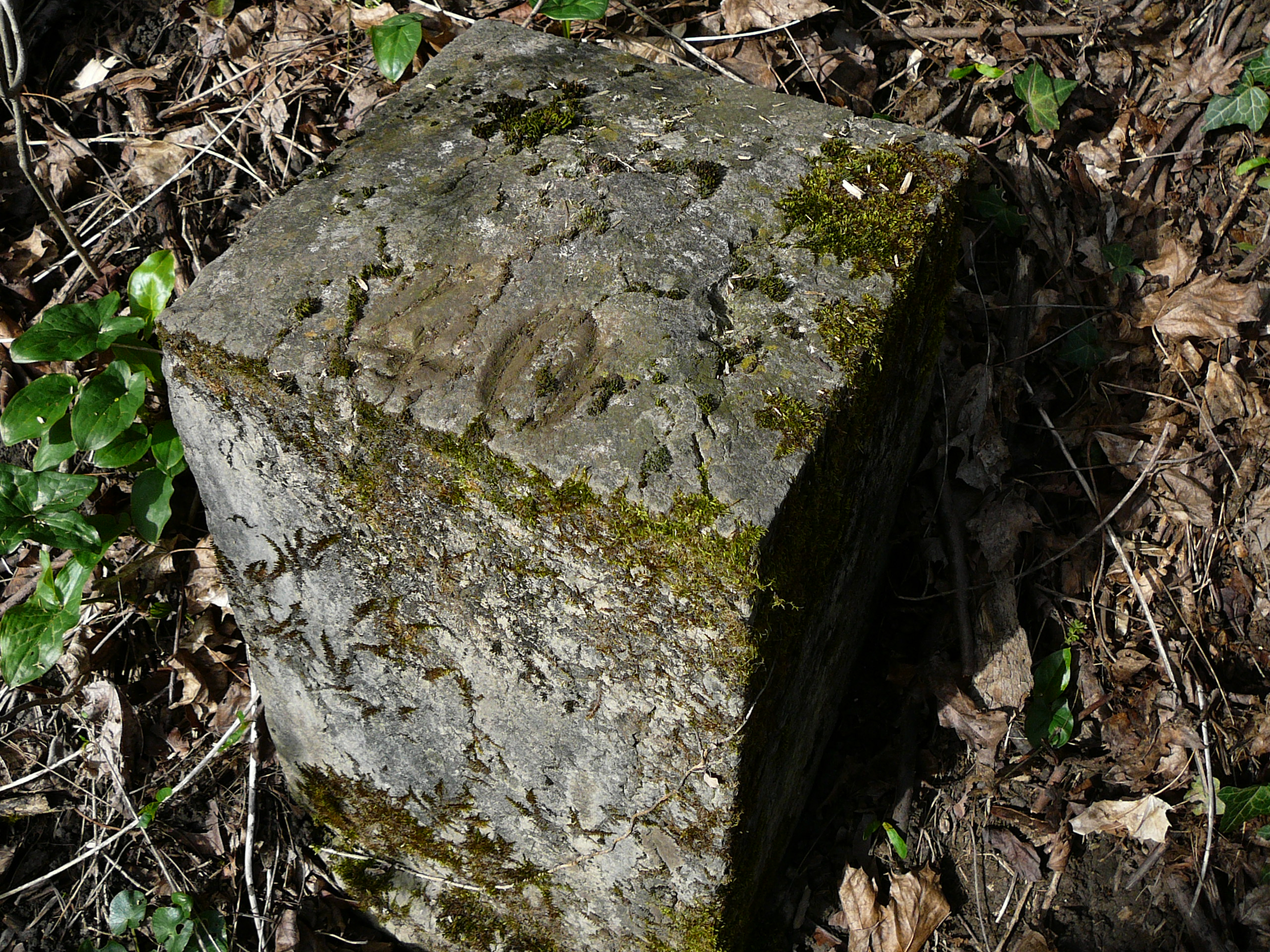 Borne de servitude militaire n°40 à proximité du fort de Loyasse. Elle délimite la première zone de servitude, de forme carrée, et gravée du nombre 40 en chiffres arabes.